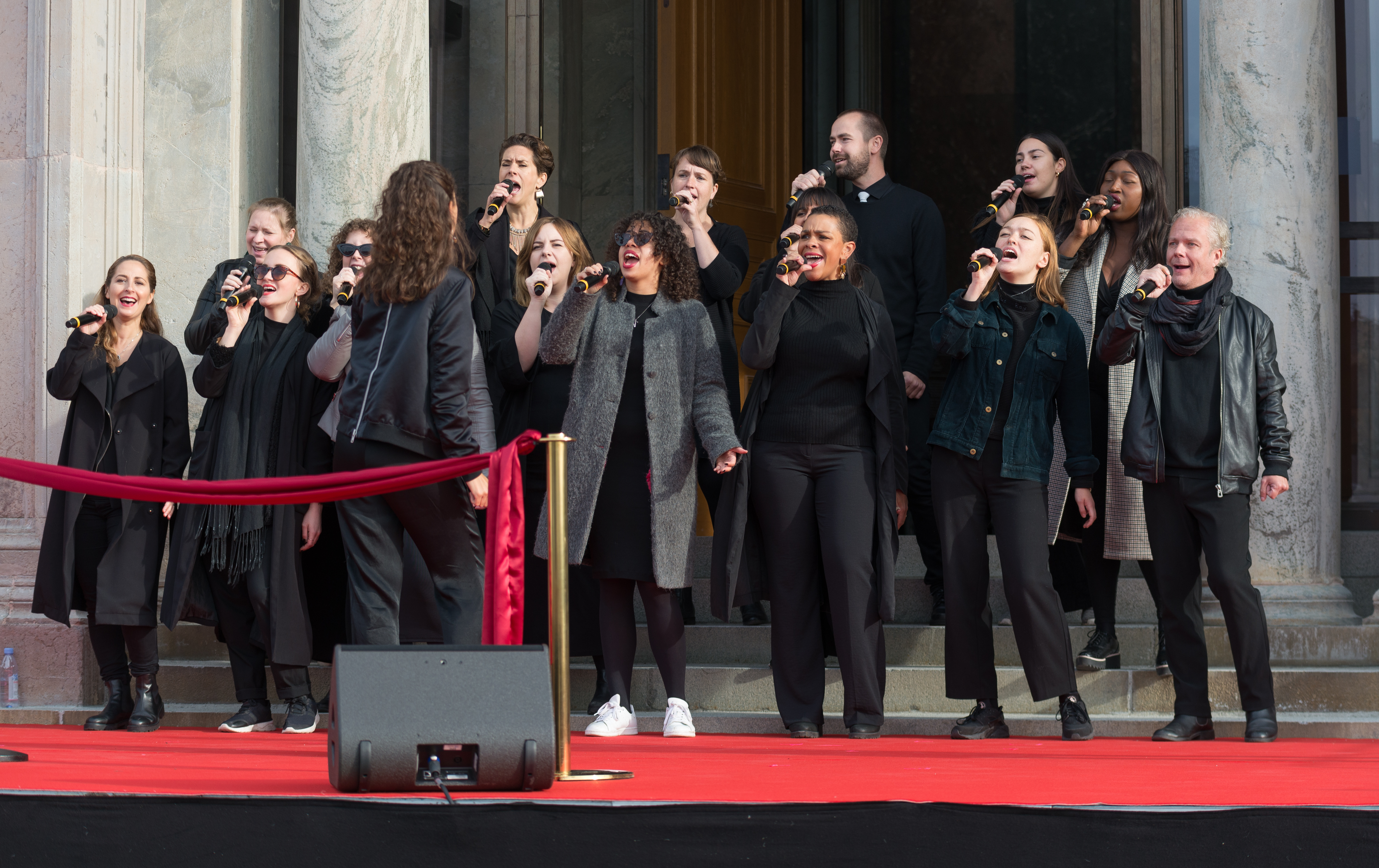 Tensta Gospel Choir uppträder i samband med nyinvigningen av Nationalmuseum i Stockholm den 13 oktober 2018.